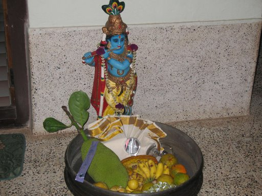 വിഷുക്കണി